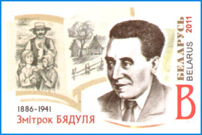 Паштовая марка Змітрок Бядуля